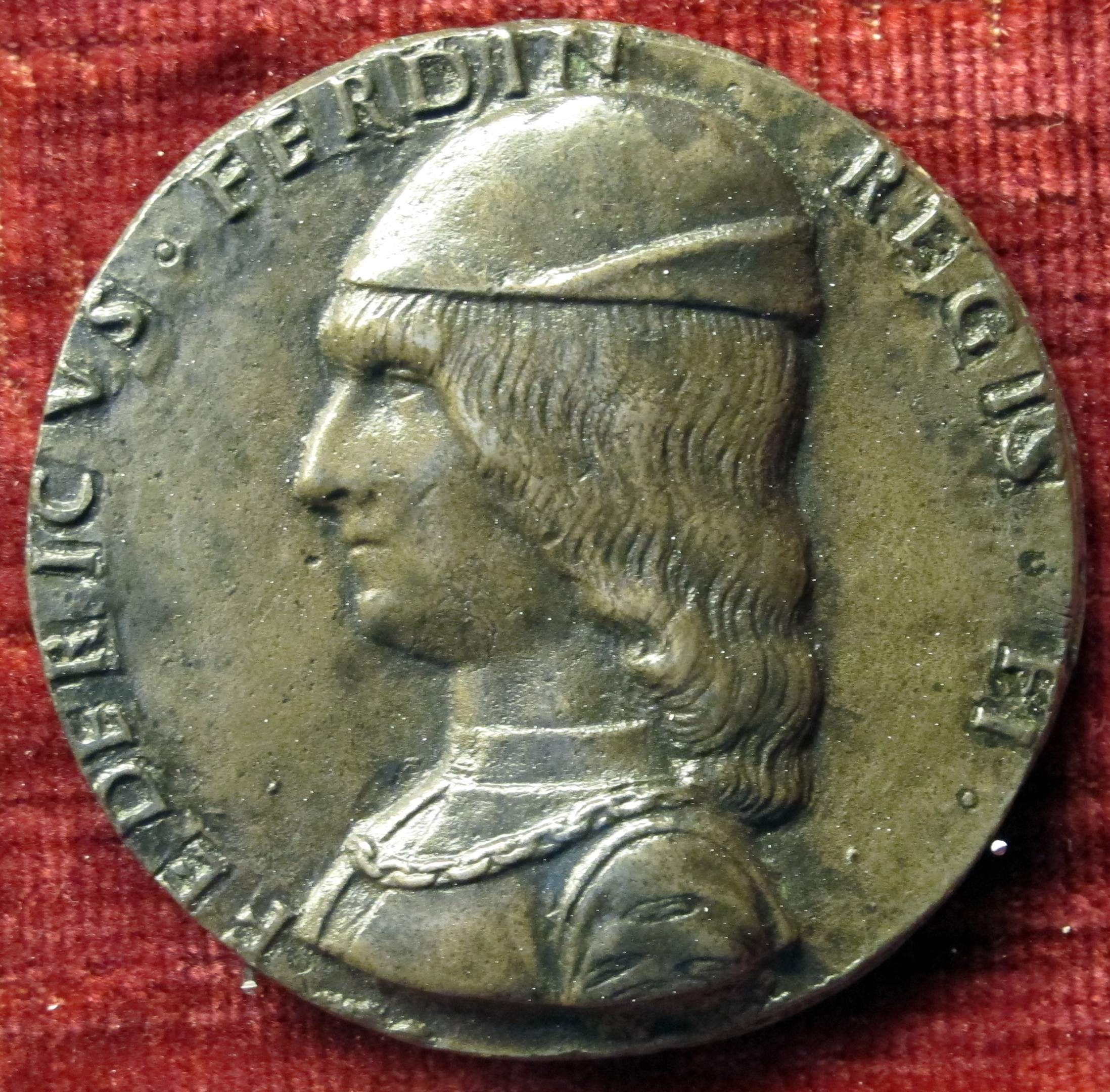 Medaglia di don Federico I di Napoli (1451-1504)